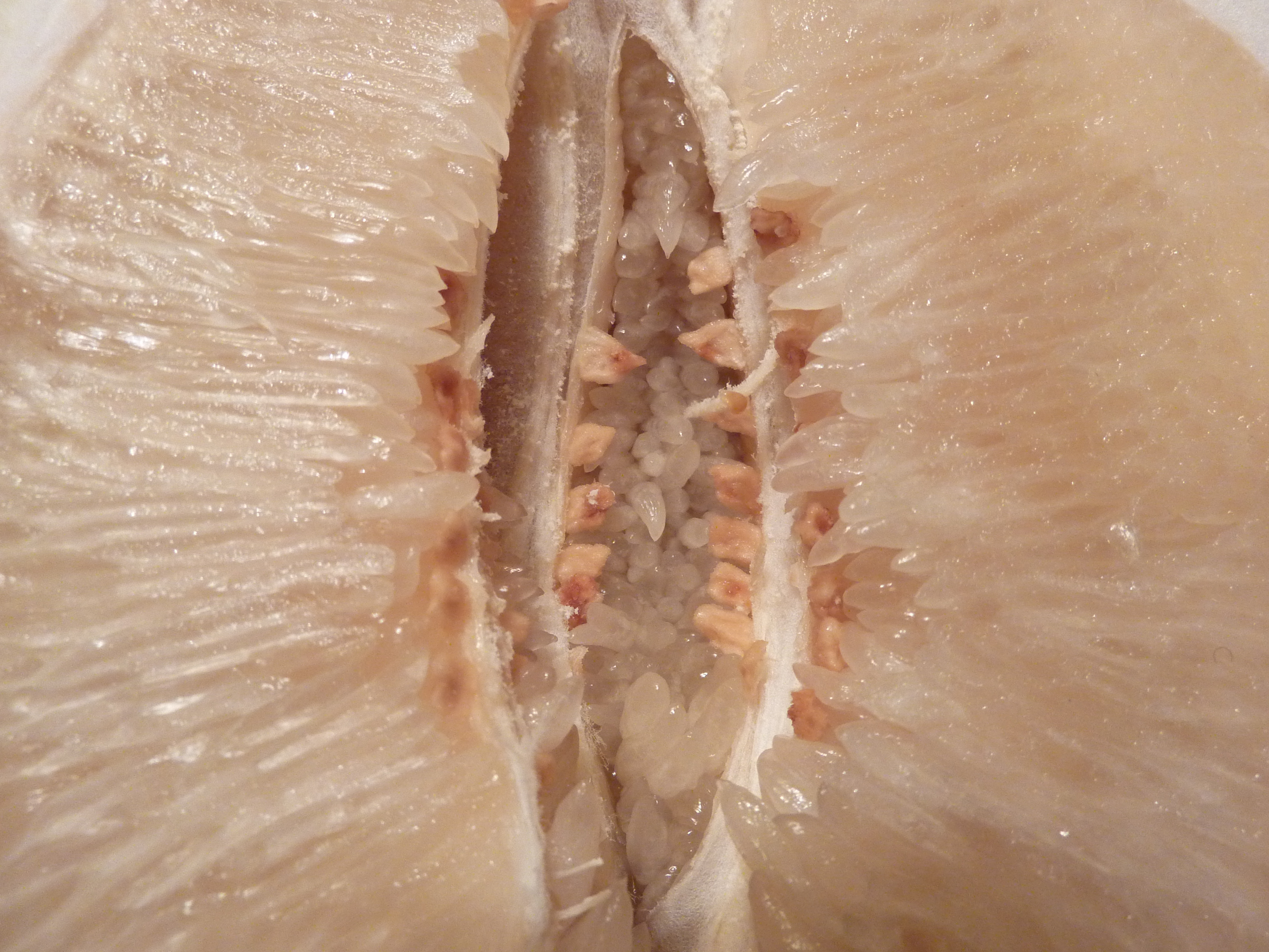 "Citrus maxima" var. 'Honey' - vue en coupe, gros plan